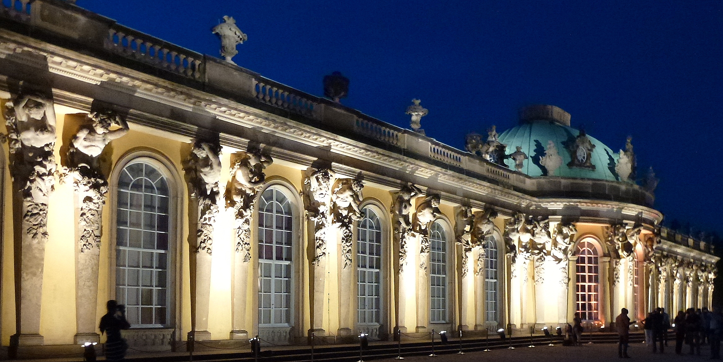 Westseite Sanssouci HofdamenflügelBacchanten und Bacchantinnen